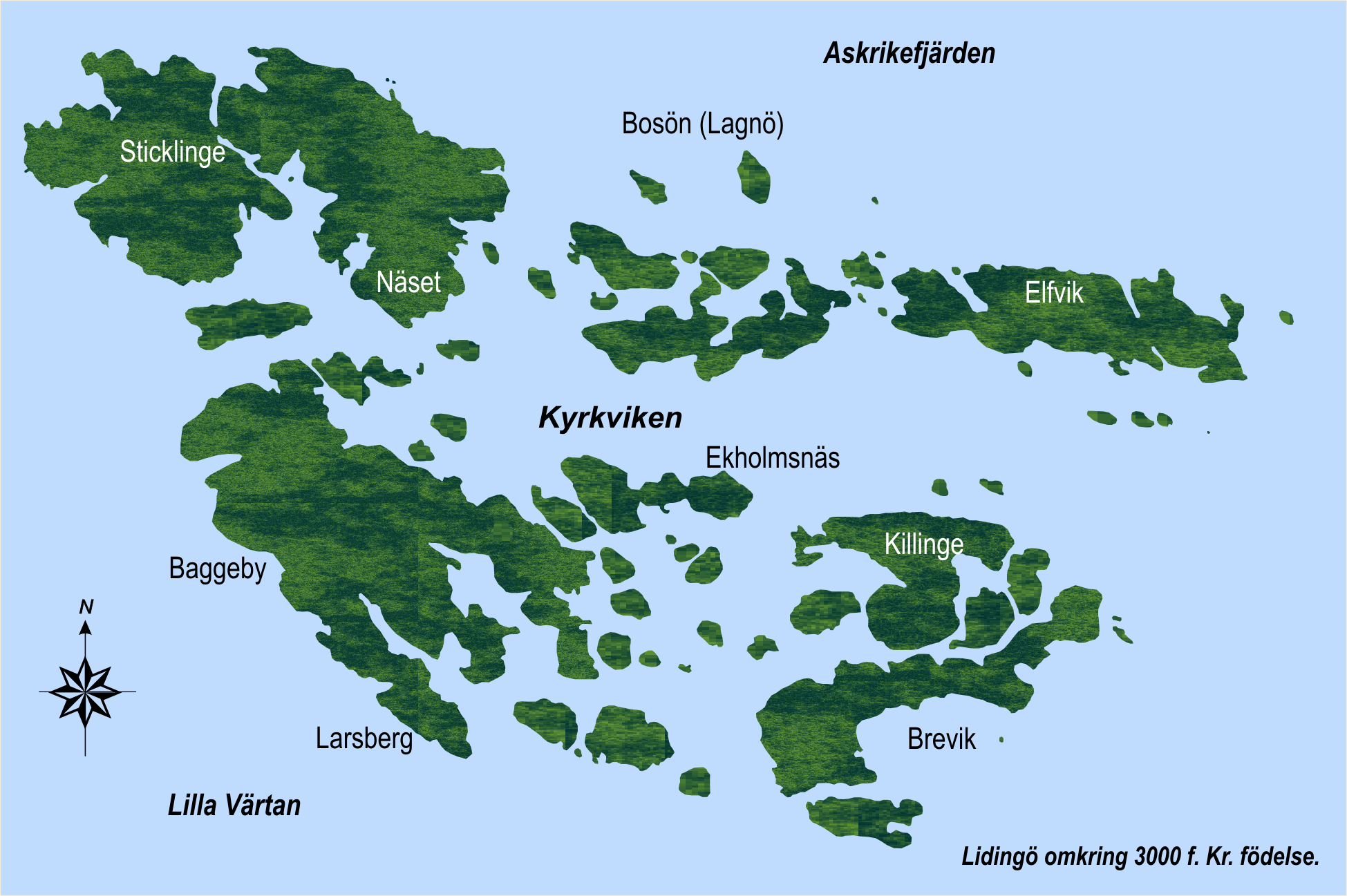 Lidingös ungefärliga landkontur år 3000 f.Kr. födelse. Baserat på utställningsmaterial framtaget Lidingö museum om Lidingö under forntiden och justerat uppskattning av landkontur vid aktuell tid.